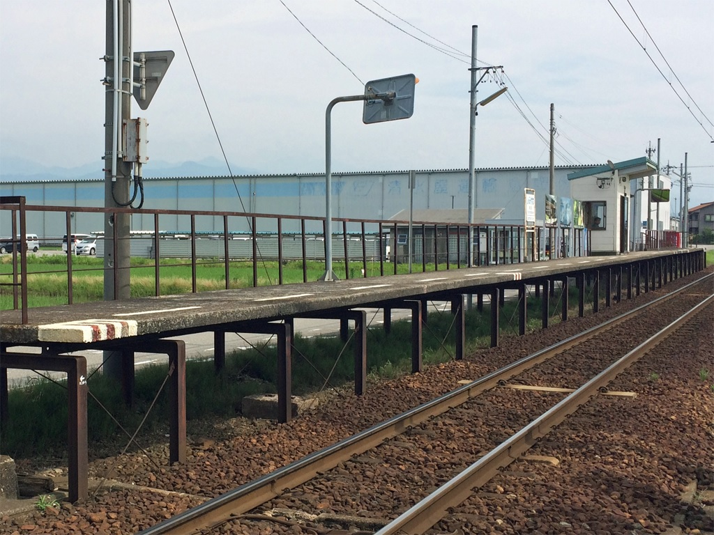 富山地方鉄道本線新宮川駅